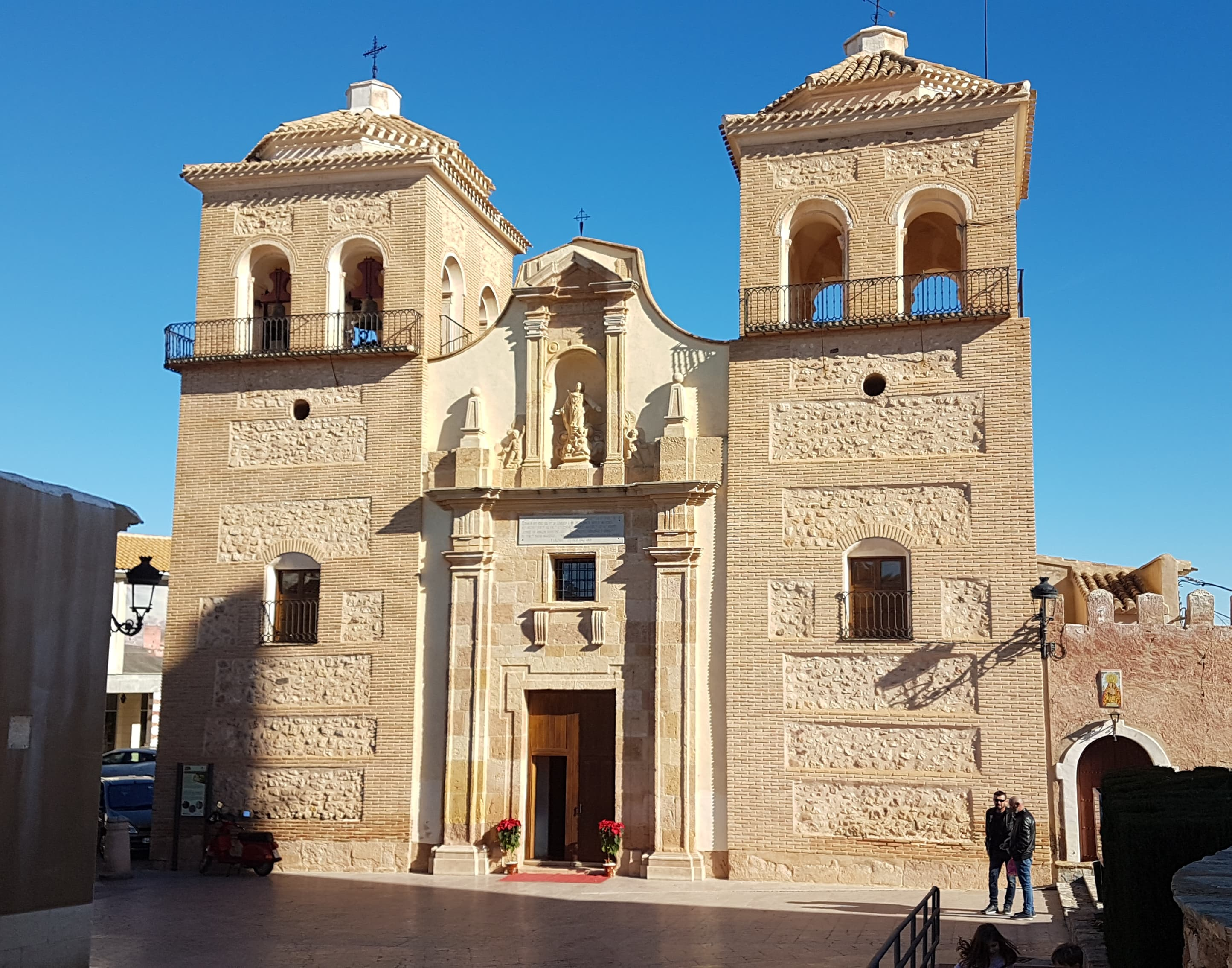 Fachada de la Iglesia de Santa María de Aledo (Región de Murcia, España).